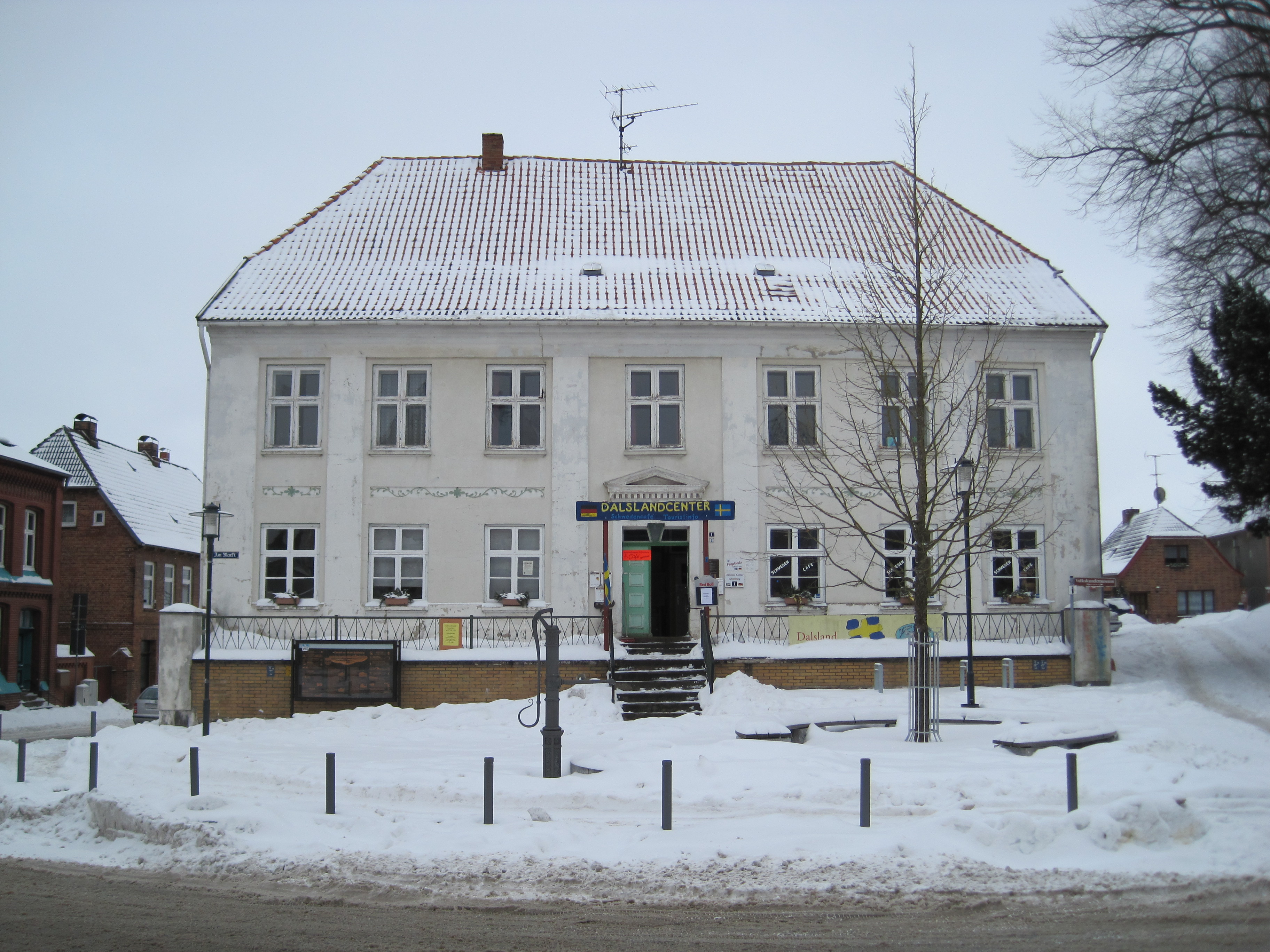 Denkmalgeschütztes Haus Am Markt 1 in Schönberg in Mecklenburg.